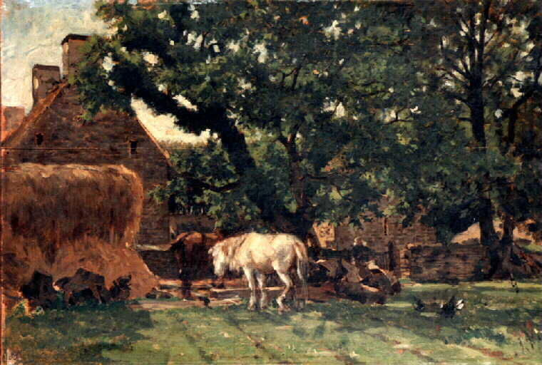 Chevaux près des châtaigniers de Kerlagadic(à Bannalec)